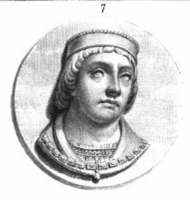 Album du Dauphiné - tome IV, litographie des Dauphins : 7. Jean Ier de Viennois